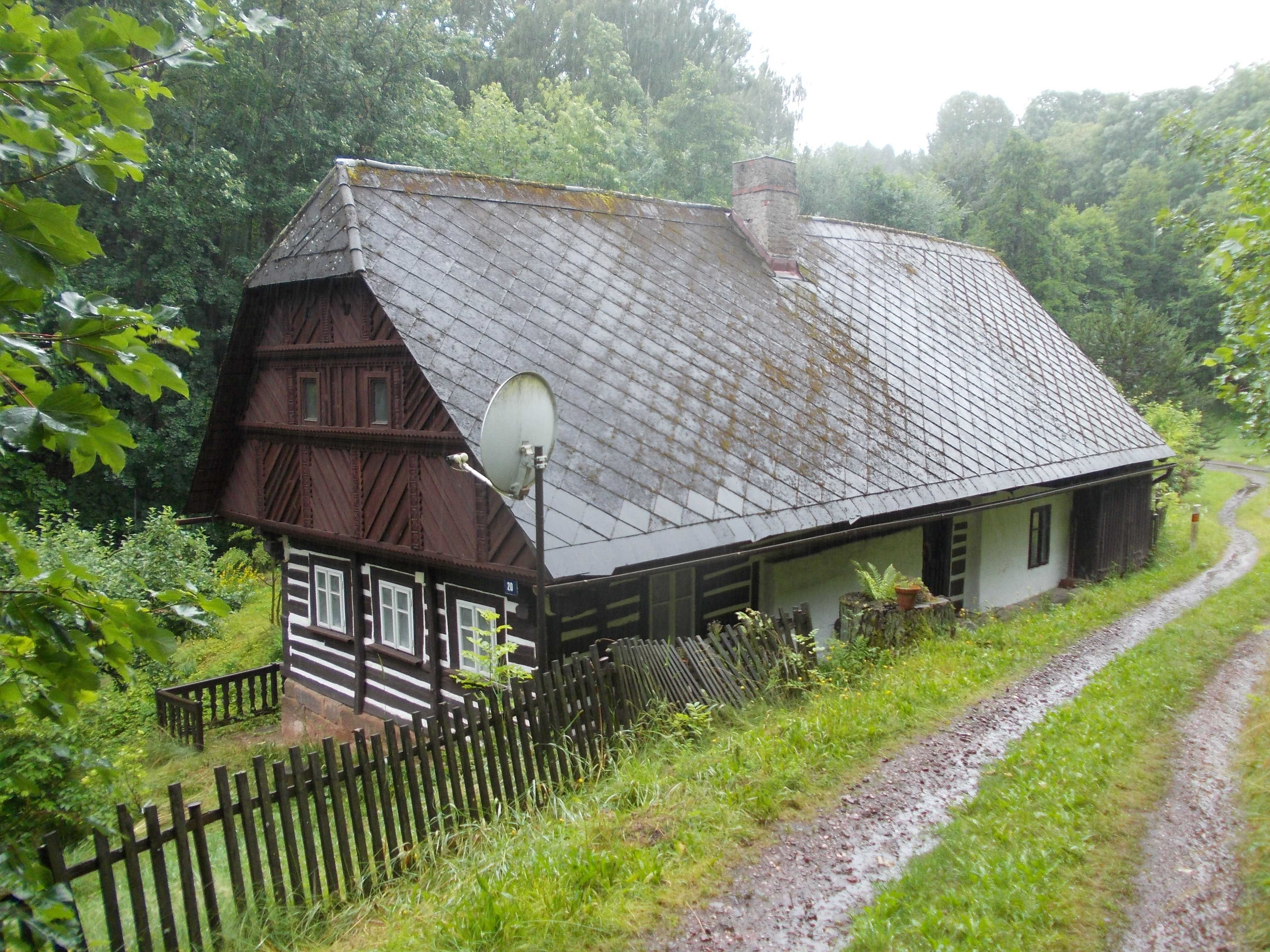 Bukovina u Čisté - dům č.p. 20